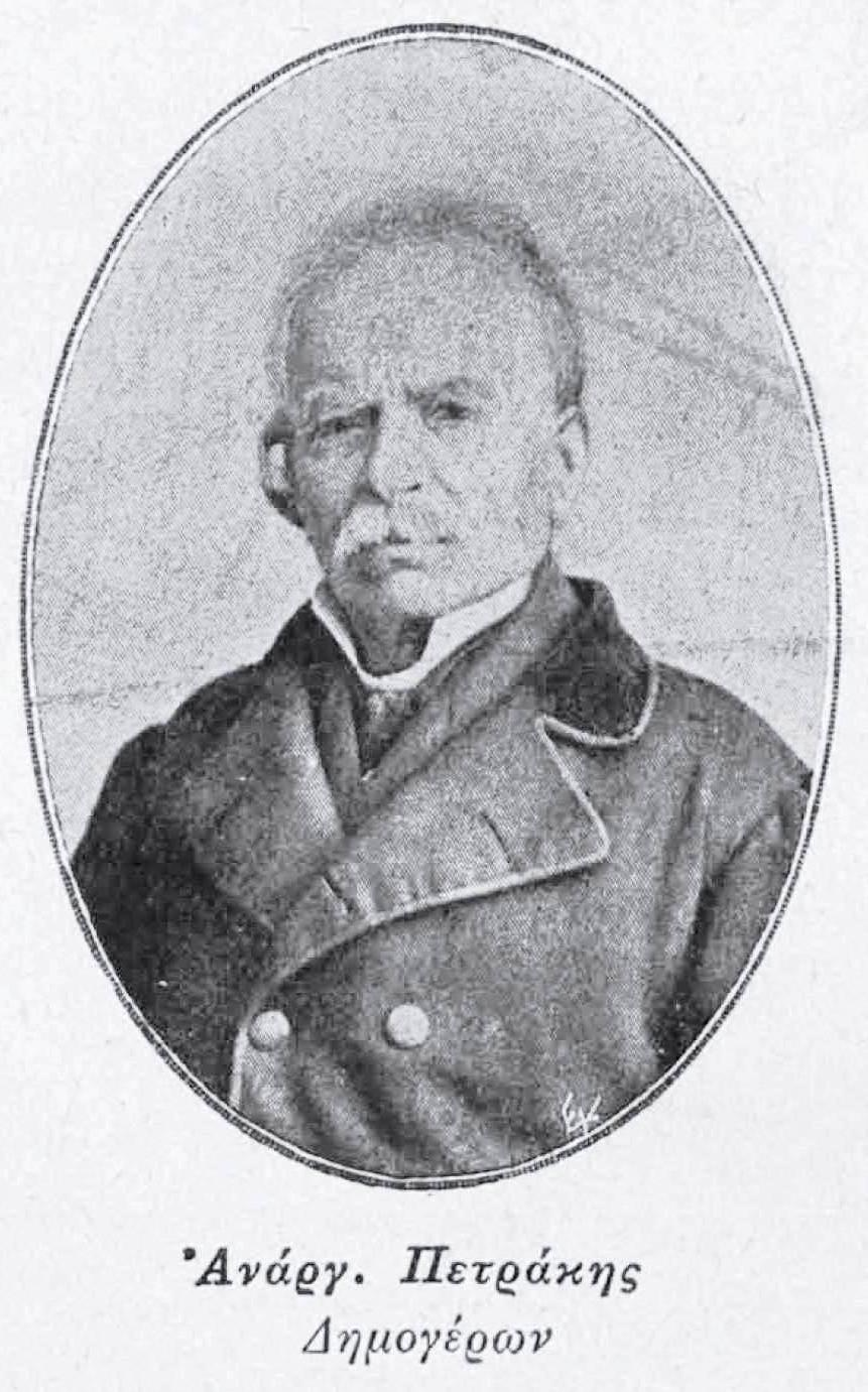 griechischer Bänker, 19.-20. Jahrhundert